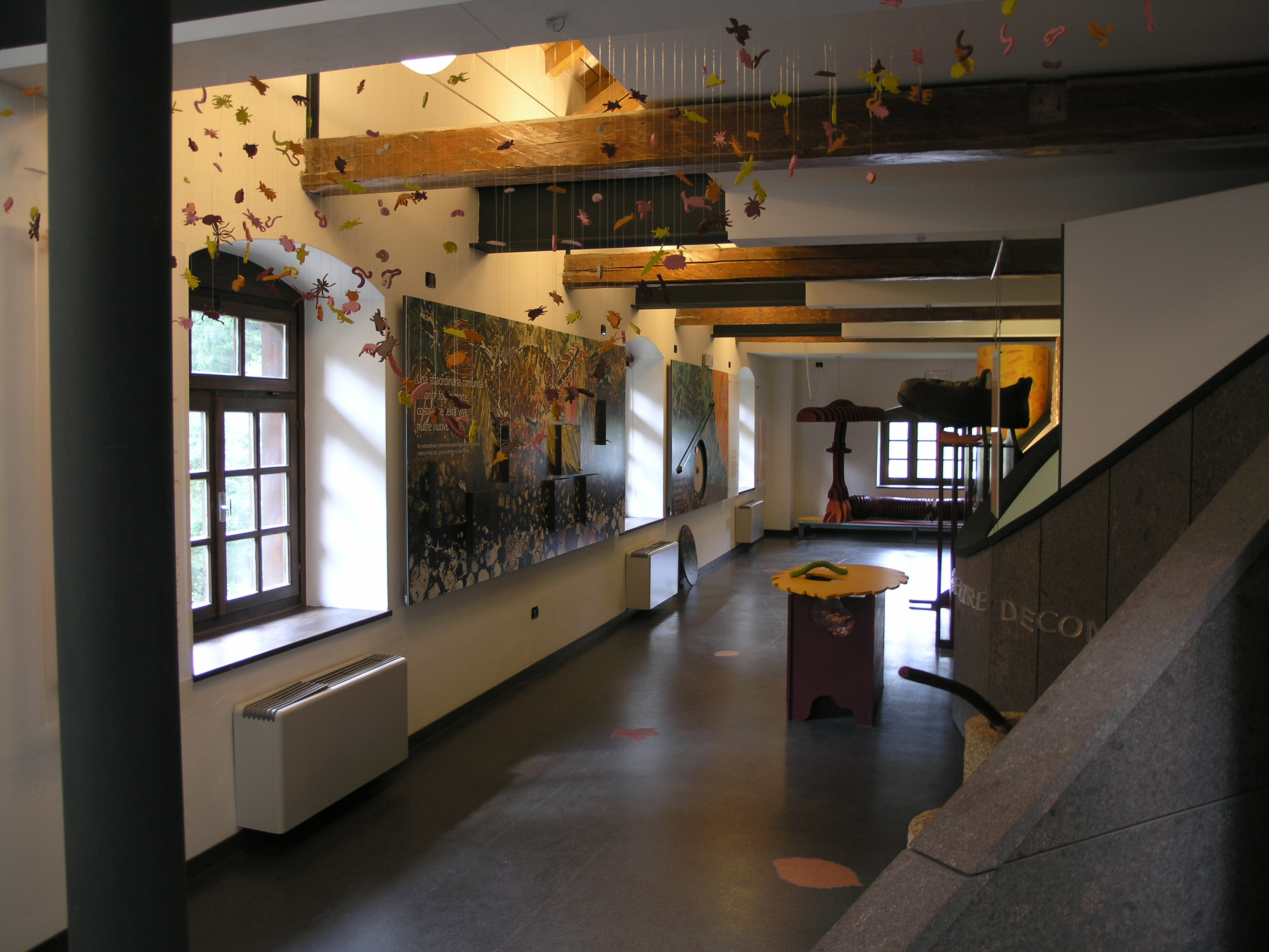 CV Paneveggio